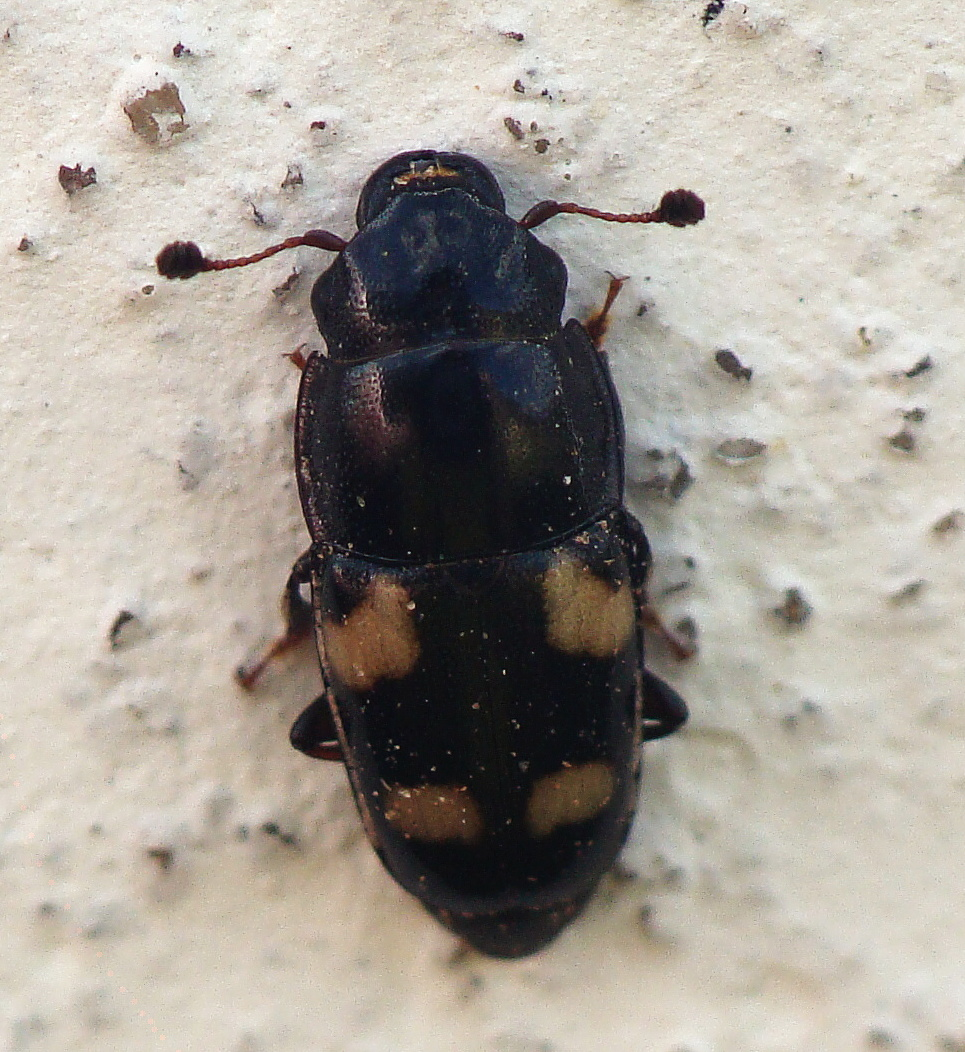 Glischrochilus quadrisignatus Česká republika, Přírodní Park Džbán - okr. Rakovník